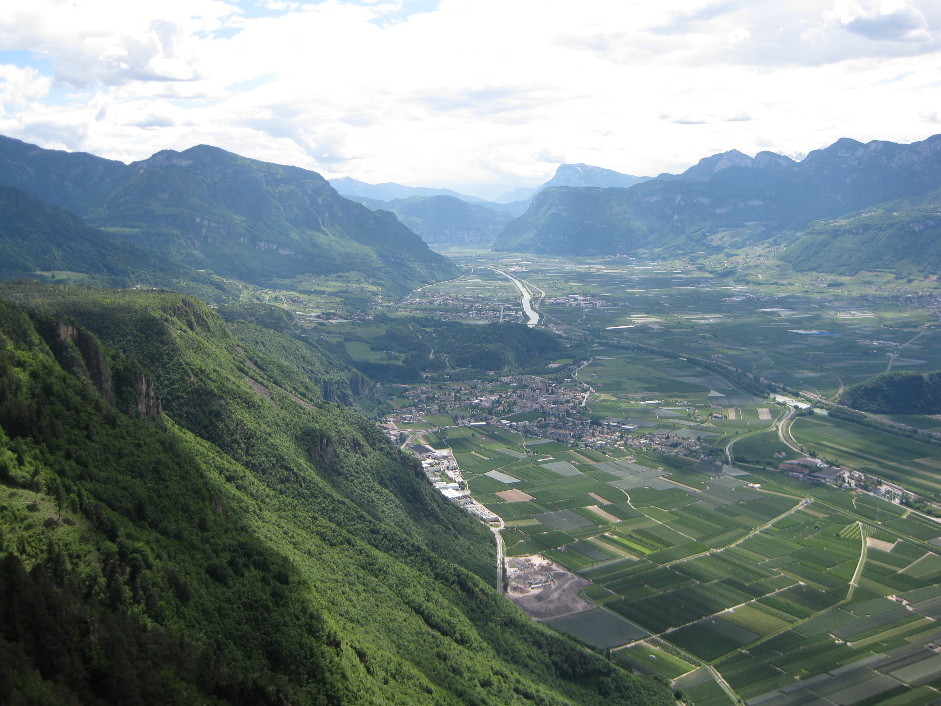 Blick auf das Unterland von der Rotwand in südliche Richtung, die Salurner Klause etwas im Hintergrund, in der Bildmitte Neumarkt, Auer und dazwischen der Hügel von Castelfeder